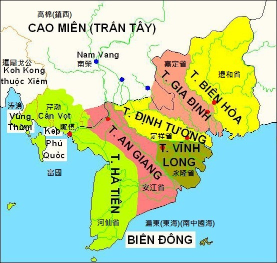 南圻六省地圖1832-1841年